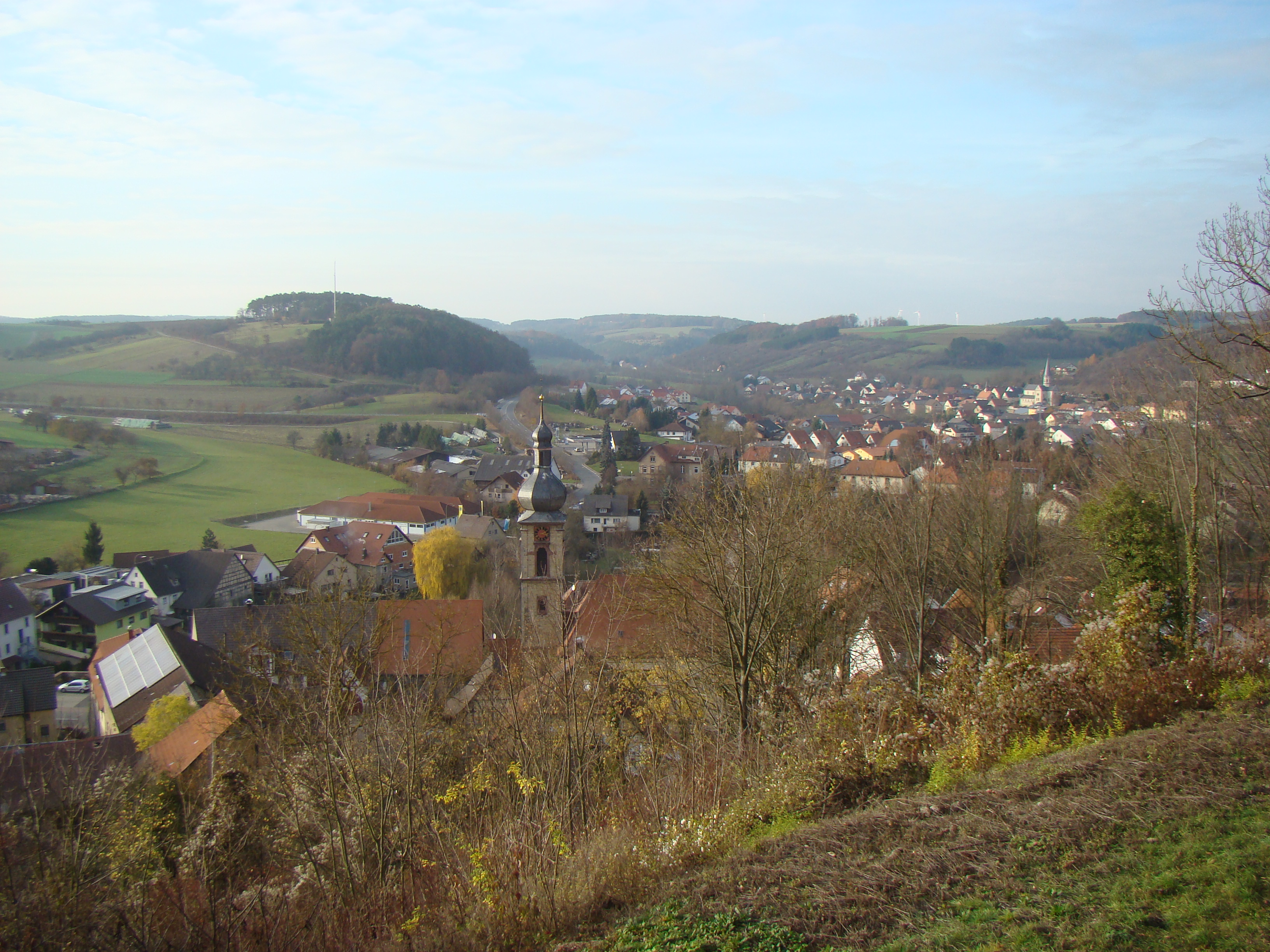 Boxberg (Baden), Blick von Burg Boxberg